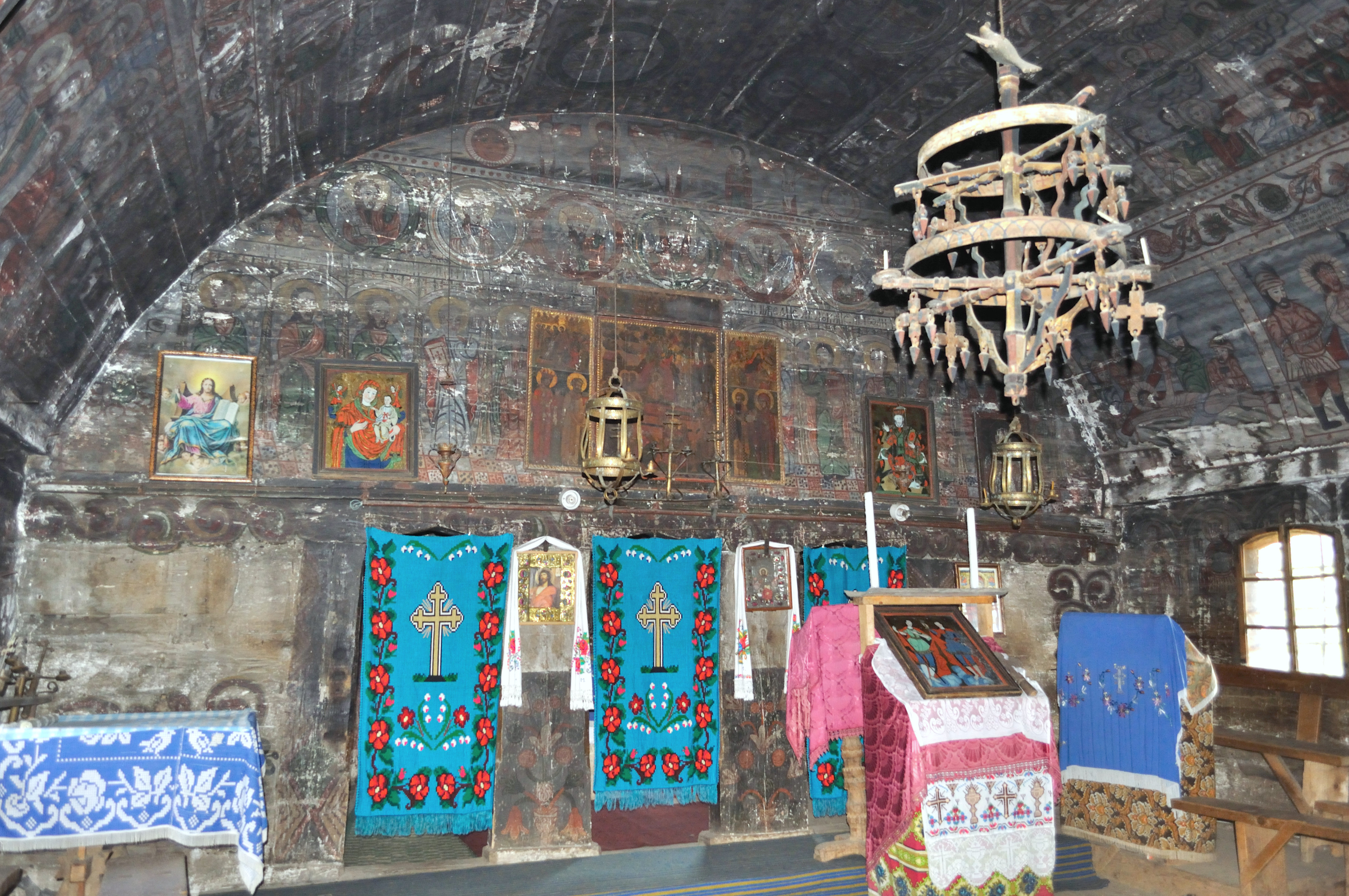 Biserica de lemn din Agârbiciu, județul Cluj